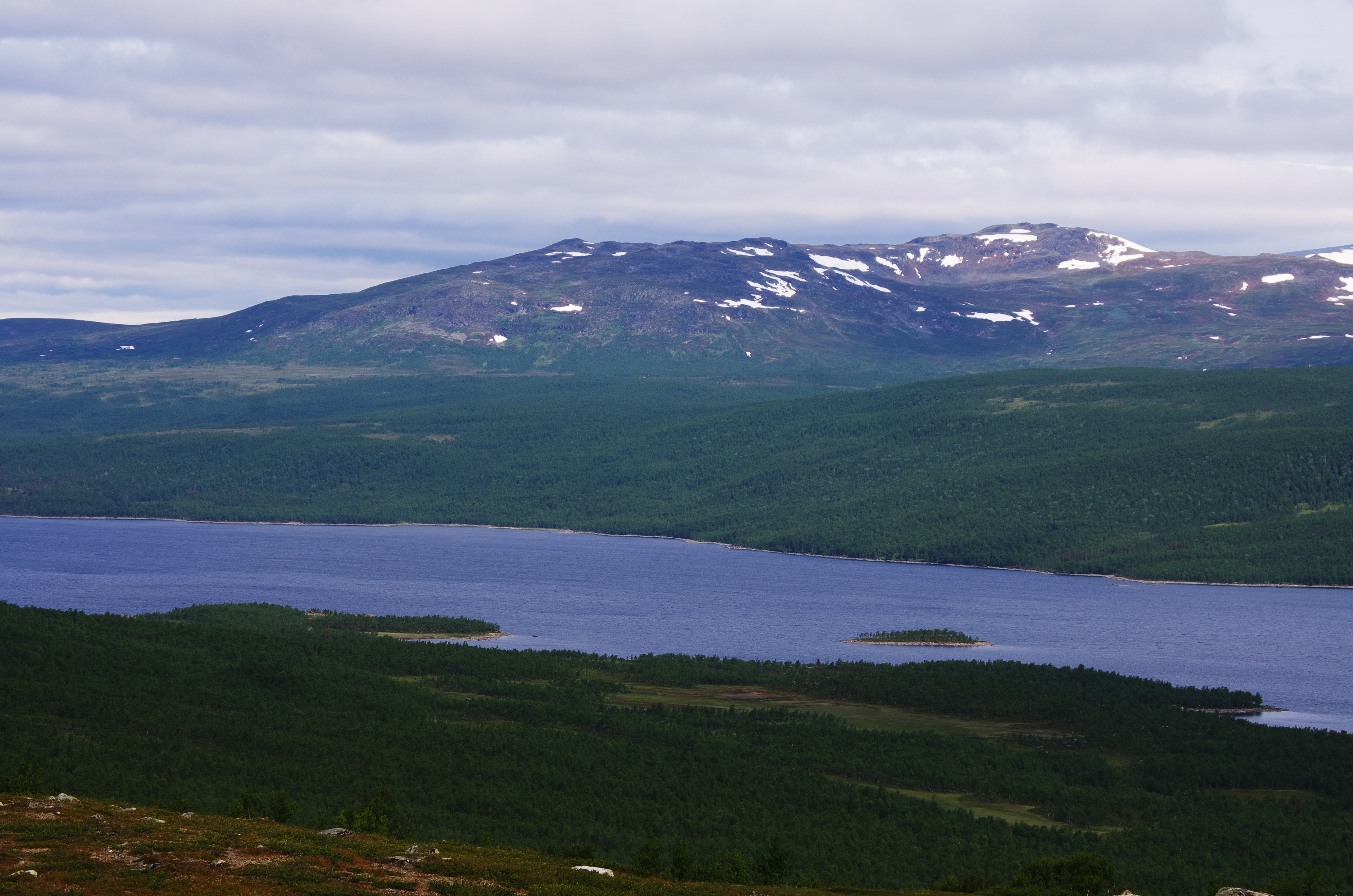 Riebnes är en sjö i Arjeplogs kommun i Lappland i Sverige. Vandringsleden Kungsleden korsar sjön. Sjön är reglerad sedan 1973 och varierar 13 meter i djup.